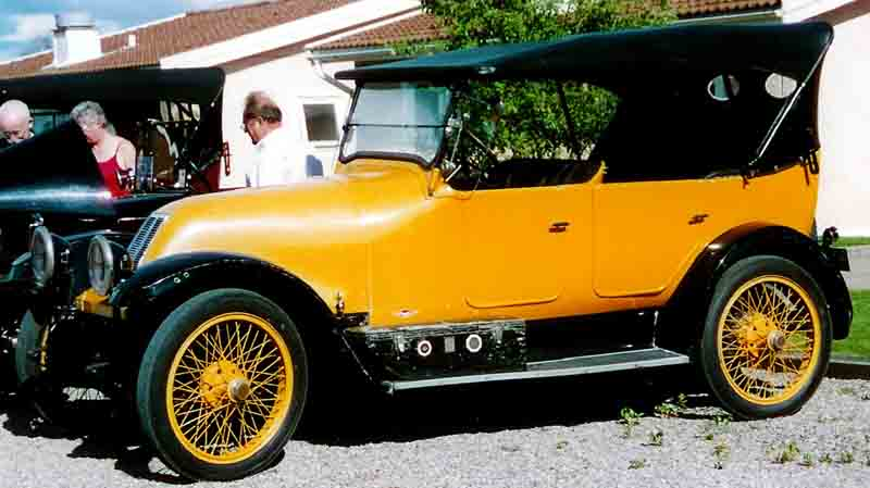 Franklin Modell 9-B Touring 1919